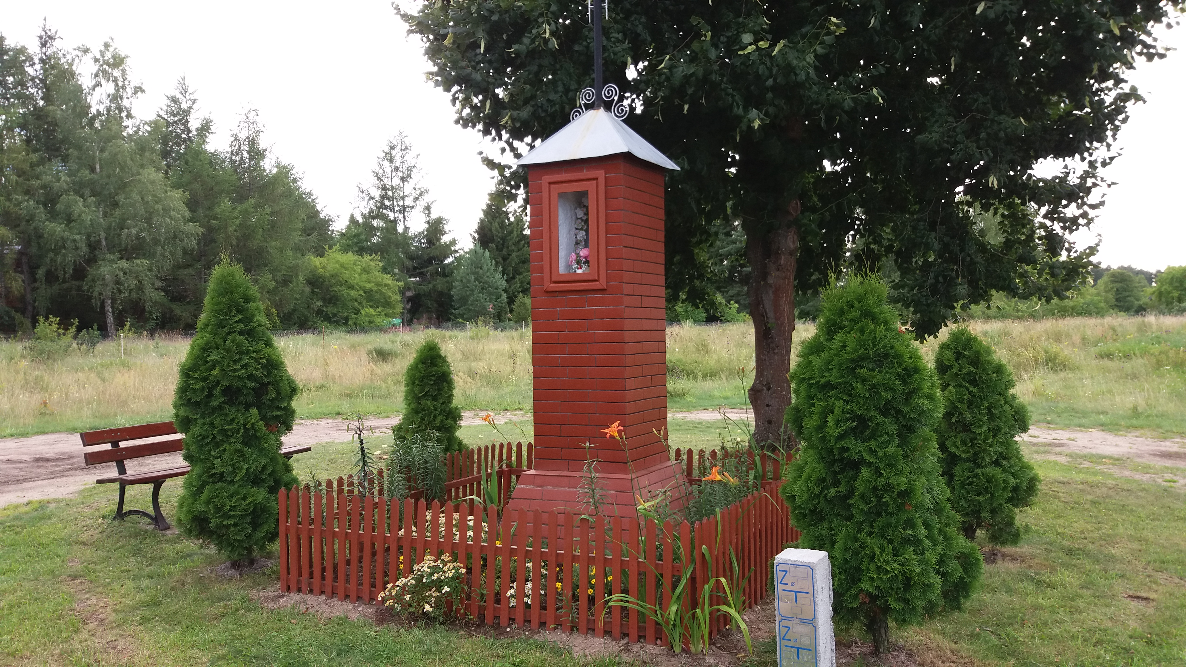 Kapliczka przy wjeździe do Koczka od strony Kierwika.